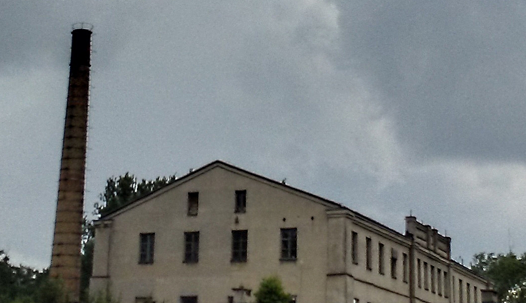 Batavia factory (est.1827), Tomaszów Mazowiecki, Warszawska Street 2, Poland